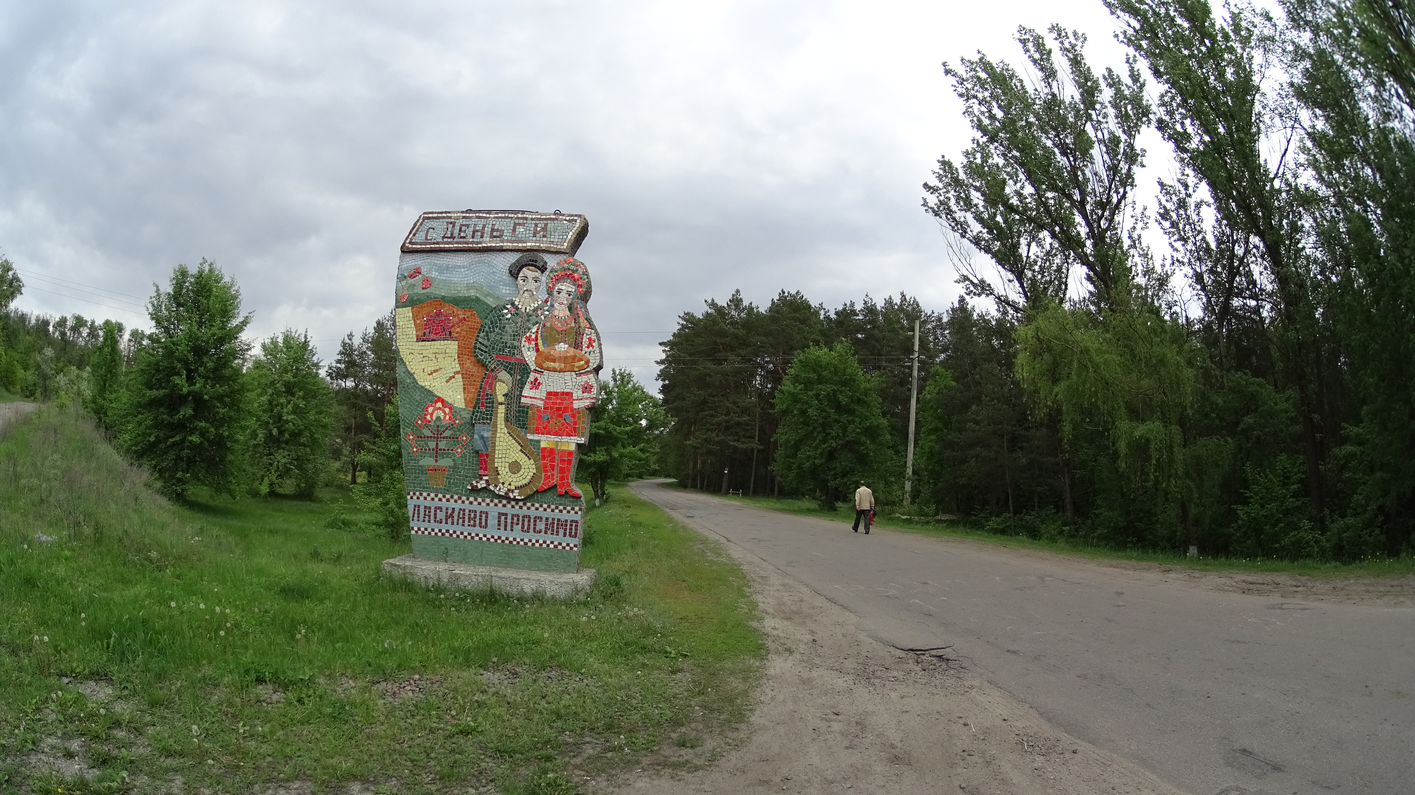 Деньги